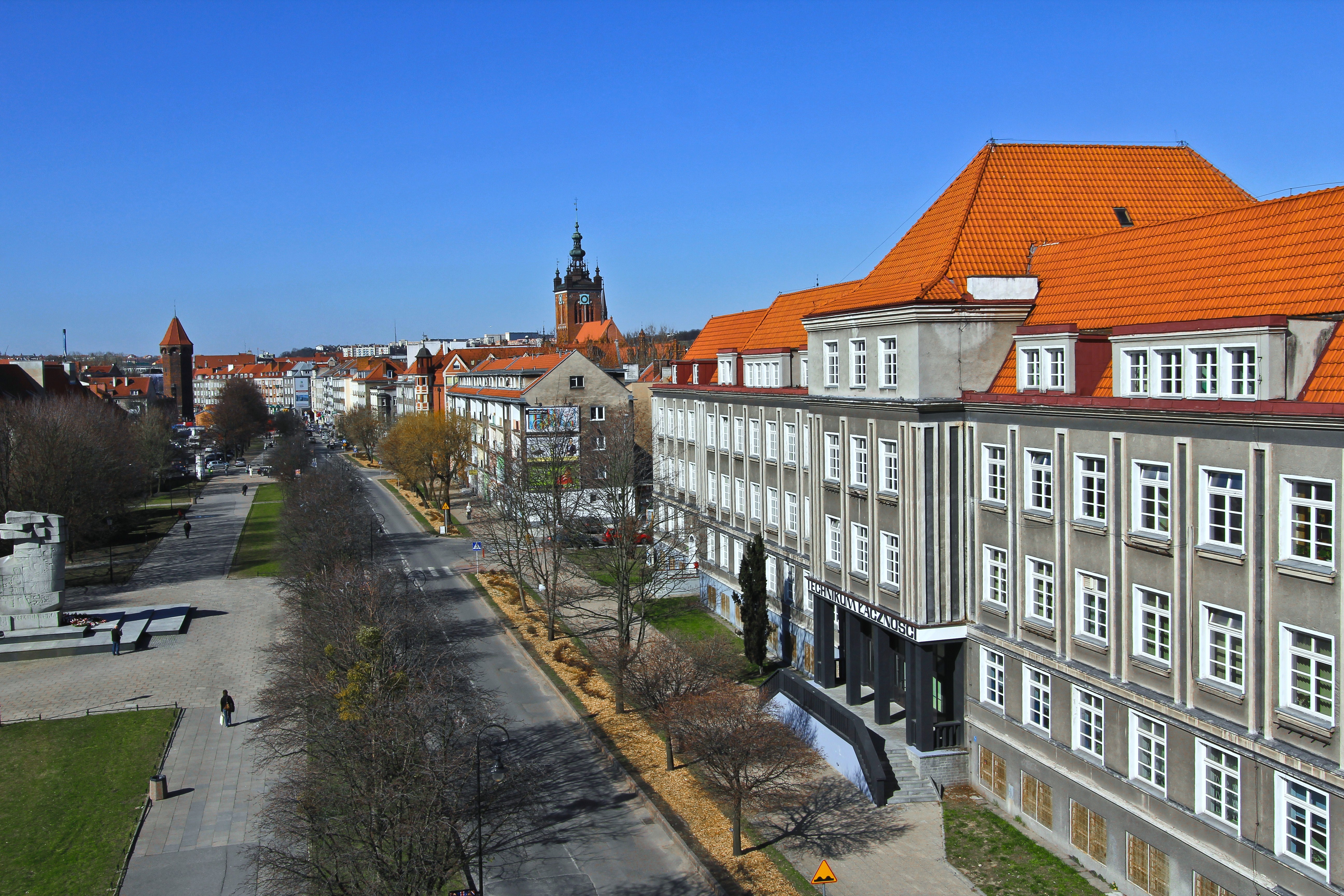 Gdańsk, ul. Podwale Staromiejskie. W tle po prawej Stare Miasto.